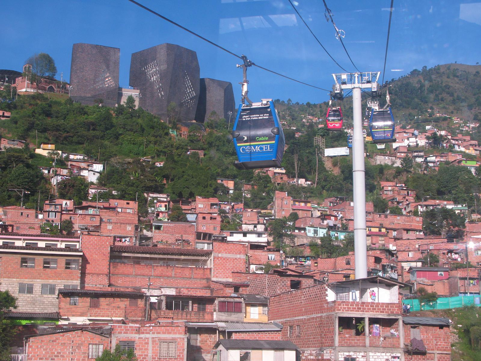 Metrocable de Medellín, Colombia